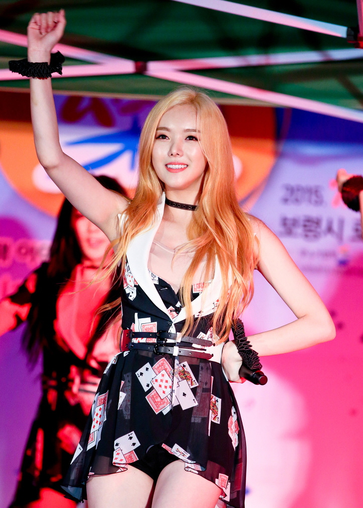 (15.07.18) 보령 도심속 썸머 페스티벌 직찍 ( 달샤벳 세리 아영 우희 가은 )